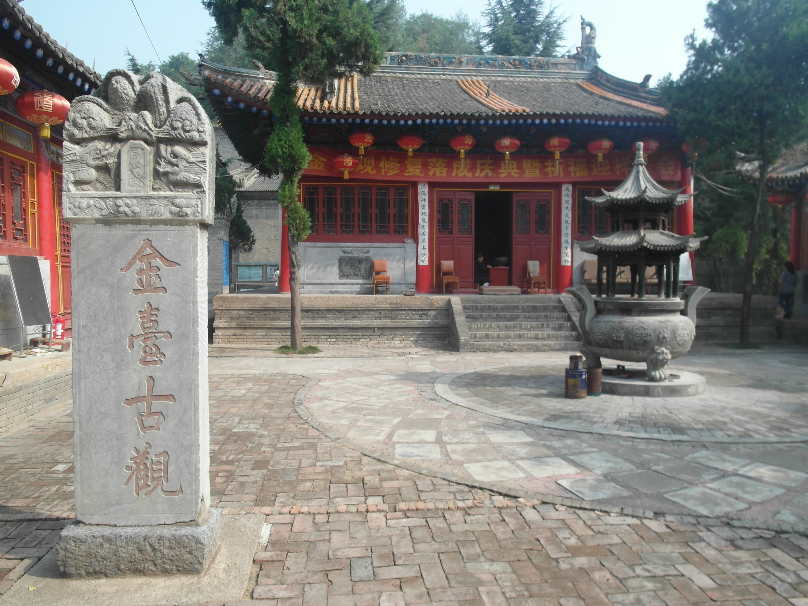 位于宝鸡市区北坡中部，传说为明代张三丰修炼之处